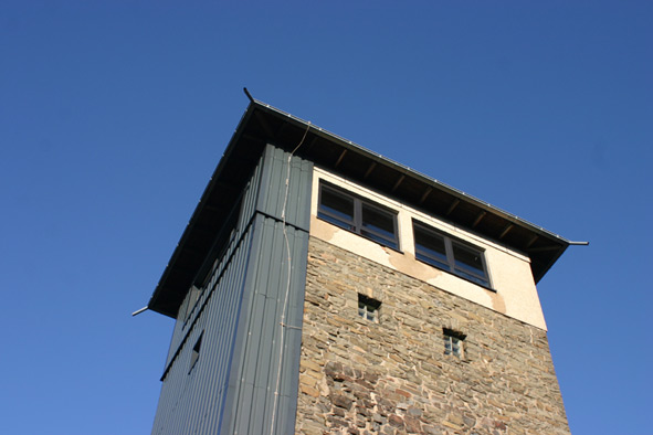 Robert-Kolb Turm auf dem Gipfel der Nordhelle/Sauerland